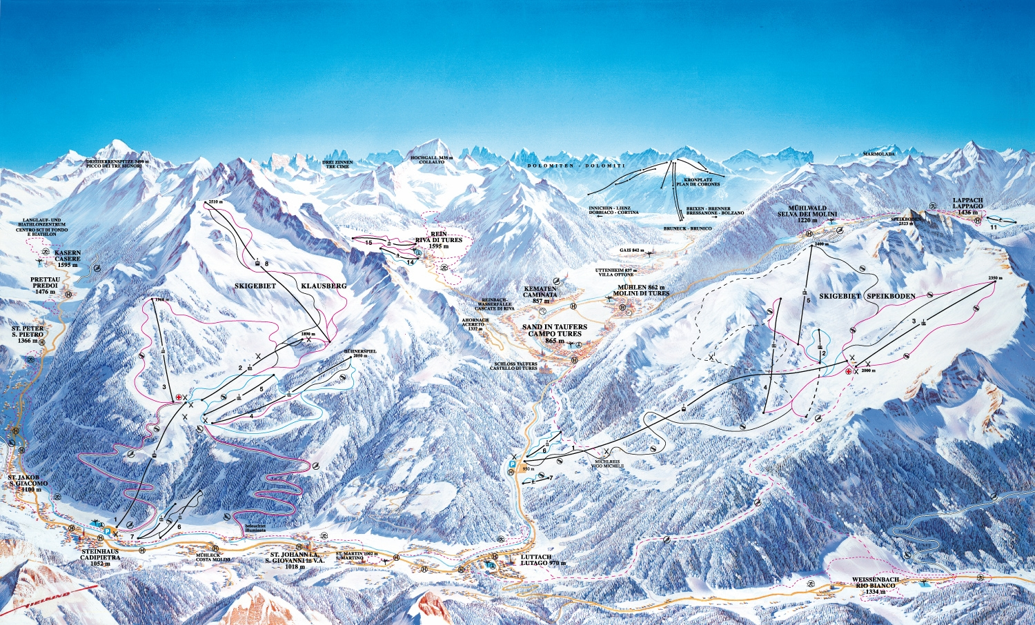 Panoramakarte Ahrntal